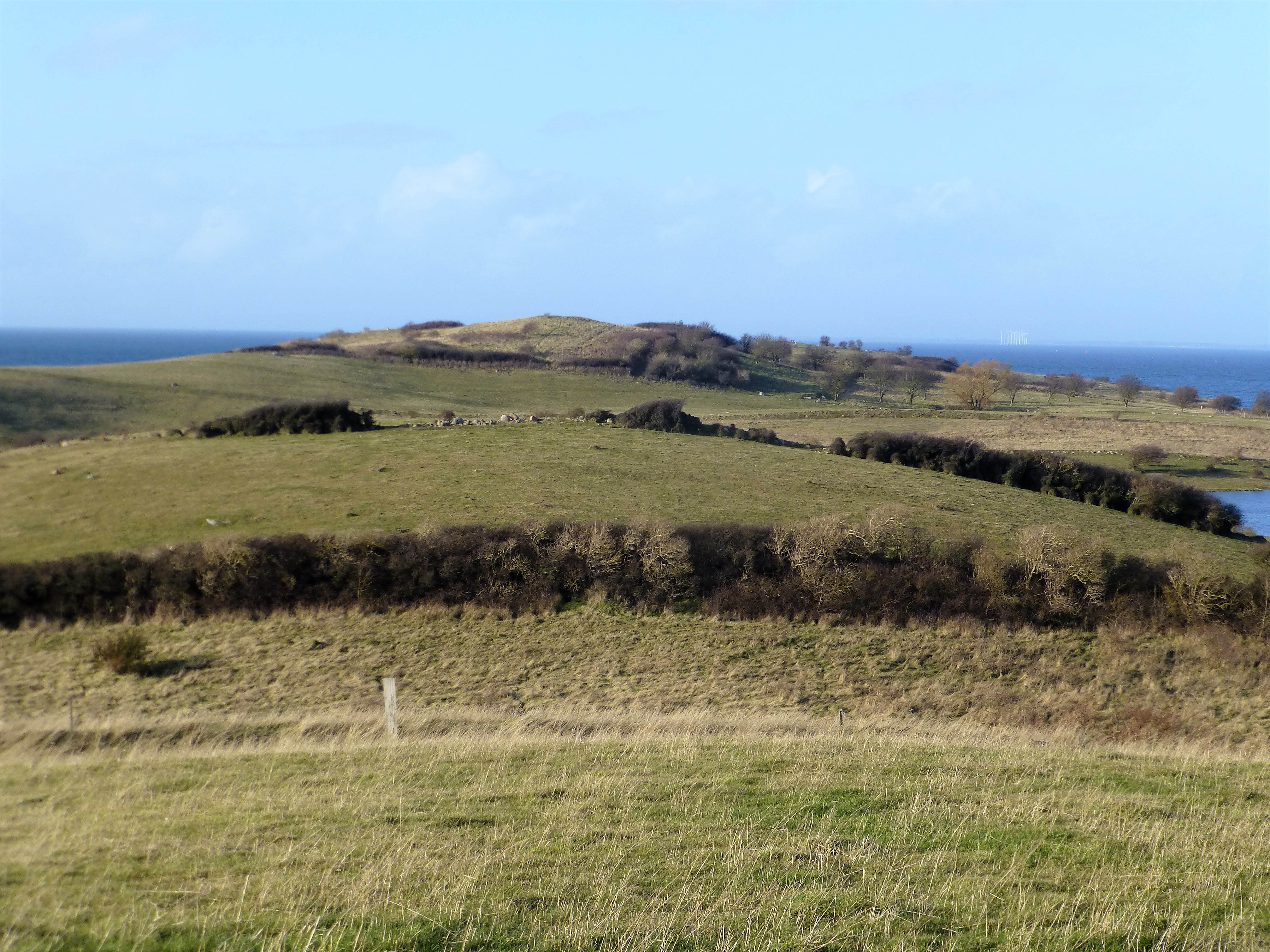 Bakkerne ved Fyns Hoved set mod nord